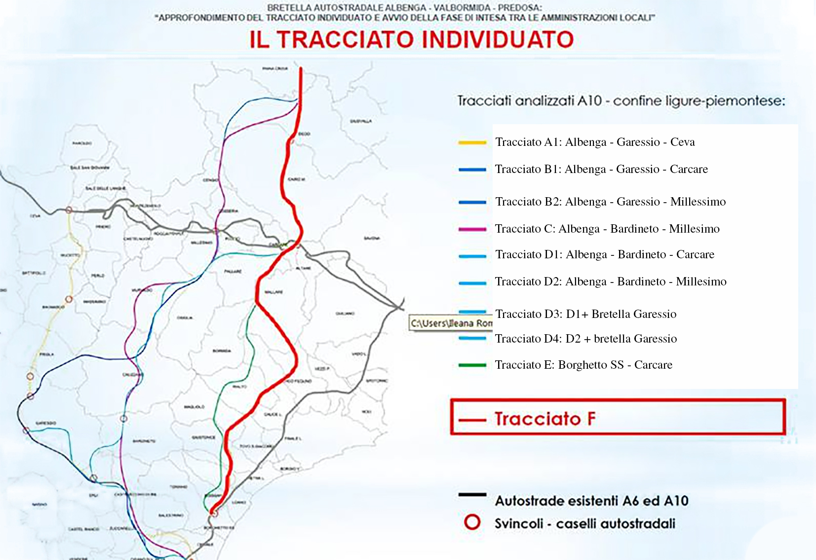 Progetto Albenga Valbormida Predosa